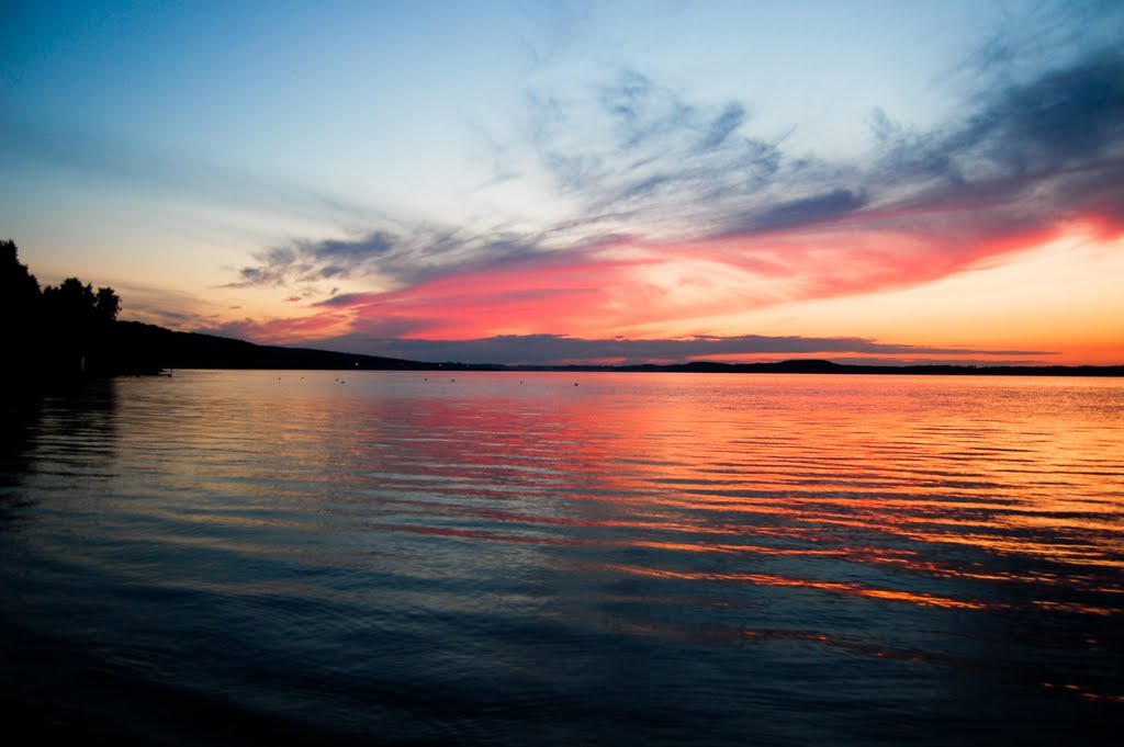 Кандры-Куль, Туймазинский район This image is related to the protected area of Russia number 0210213